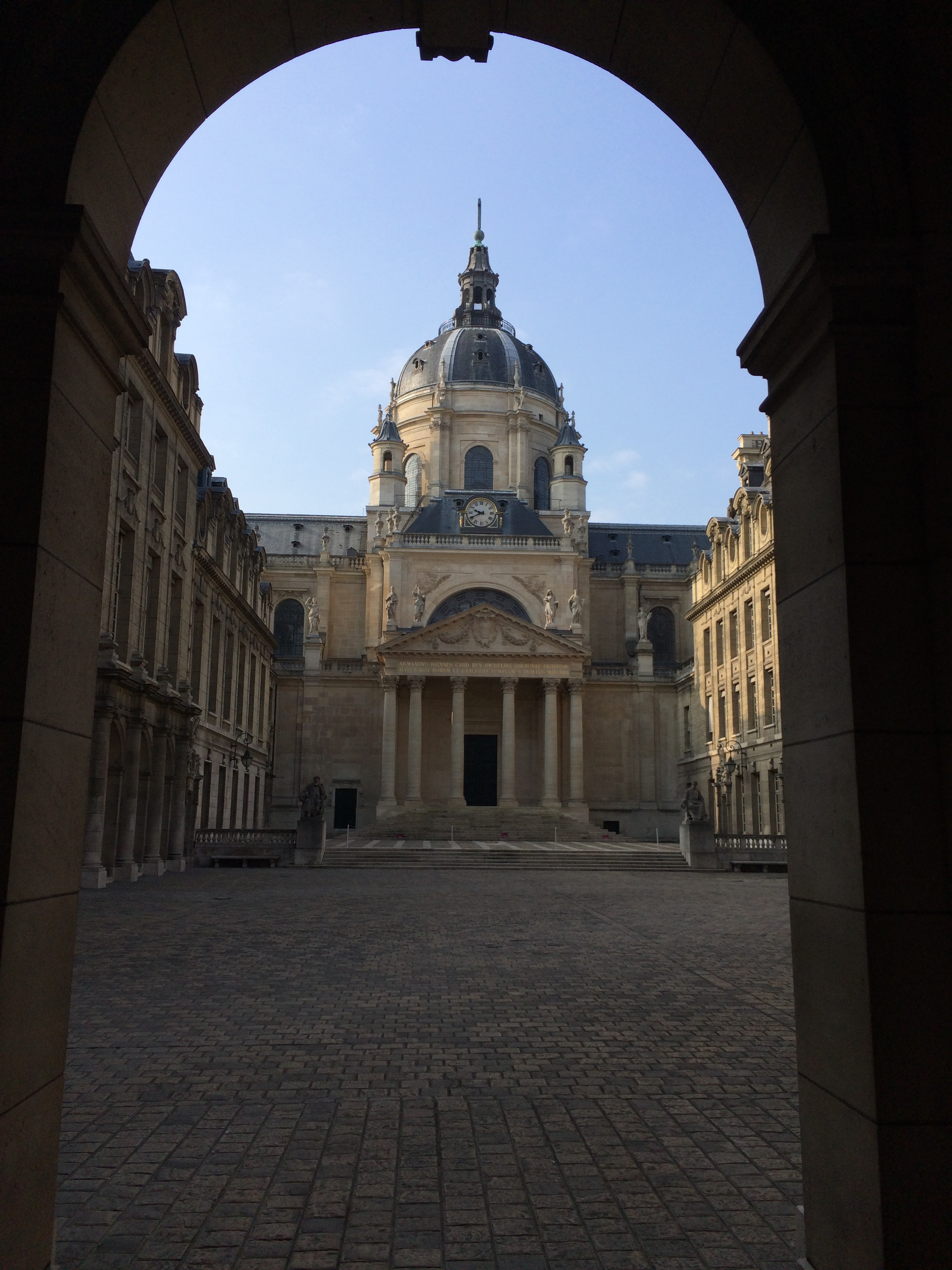 पाली pālī: Vista patio central